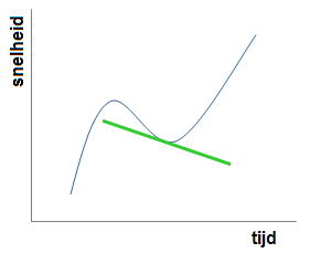 a = dv/dt gebaseerd op wiki en (GNU FDL); verder aangepast in paint